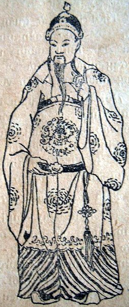 Bình An Vương Trịnh Tùng